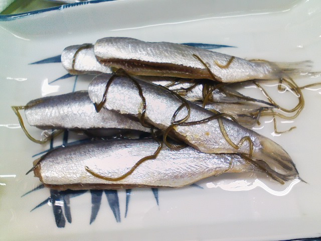 赤羽まるます家の(本日)のおすすめ品のままかり。メザシの酢漬けでしょうか。 シメサババーガーに通じる旨さがイカします